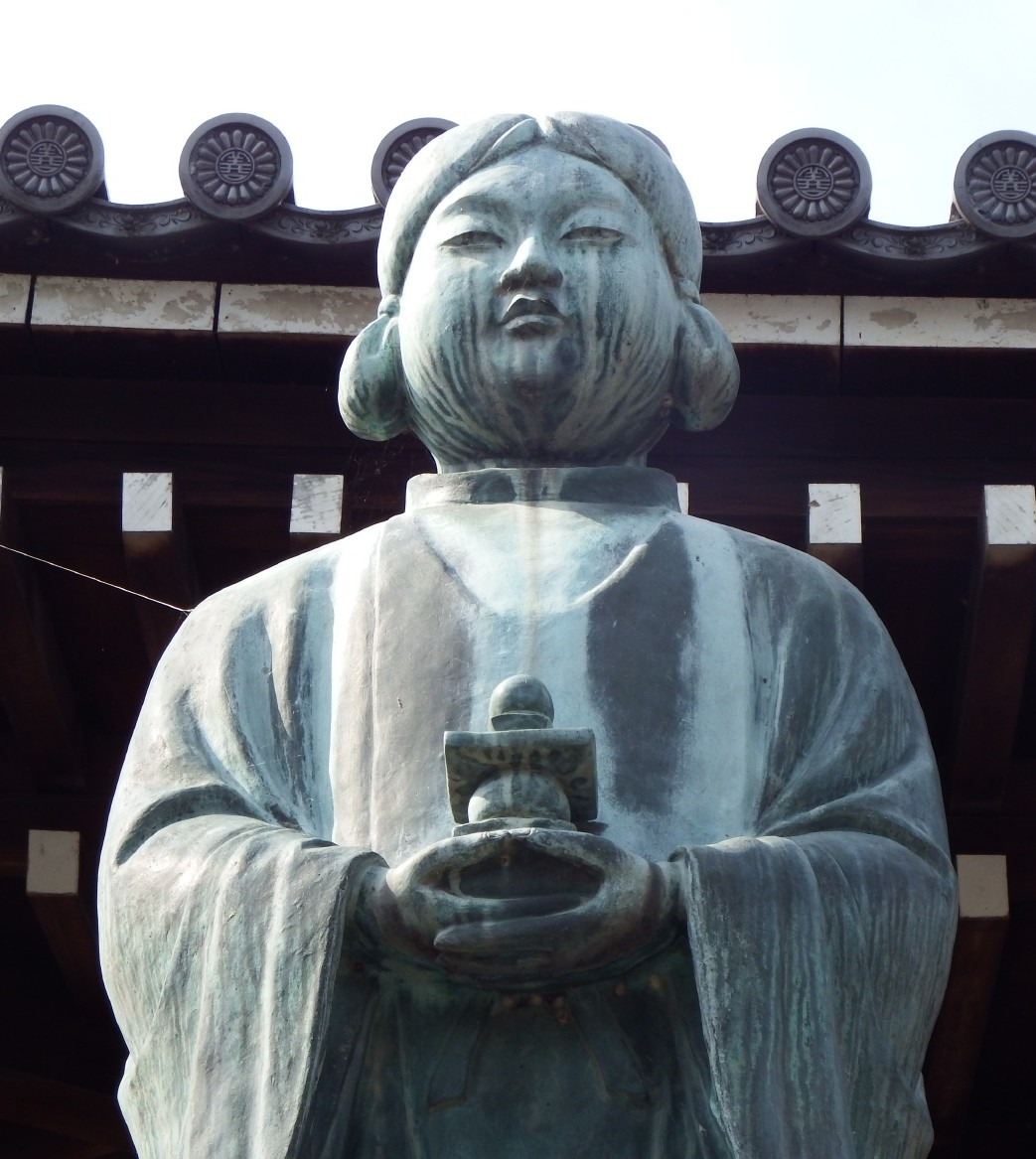 善通寺の稚児大師